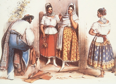 Poblanas, una viñeta que aparece en el libro Viaje pintoresco y arqueológico sobre la parte más interesante de la República Mexicana en los años transcurridos de 1829 hasta 1834.